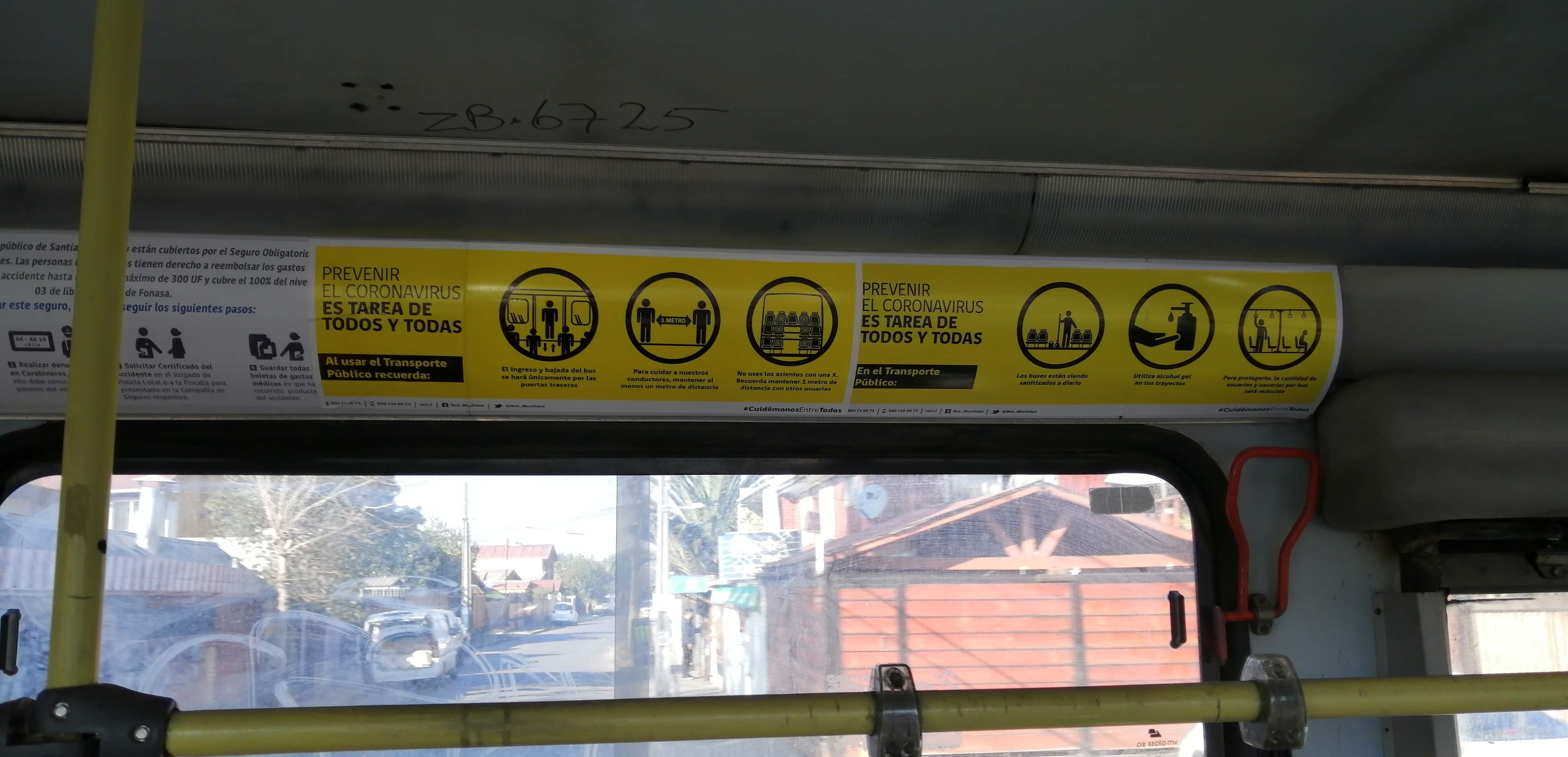 Como una de las medidas tomadas por el sistema de transporte público de Santiago, se añadieron carteles en los buses entregando recomendacones sobre como comportarse dentro para evitar riesgos de contagio.